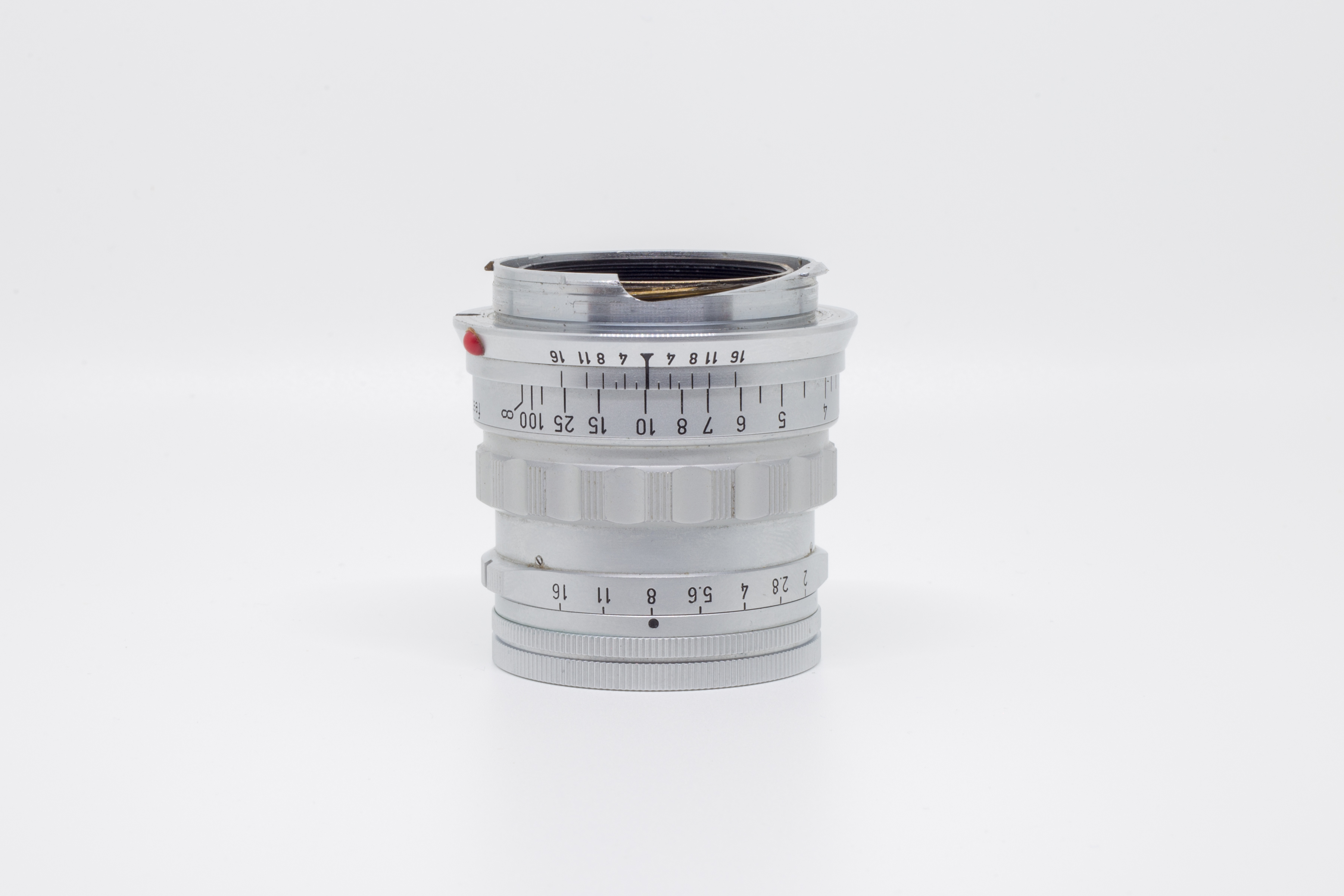 1960 Leica Summicron 50mm (5cm) lens. LTM